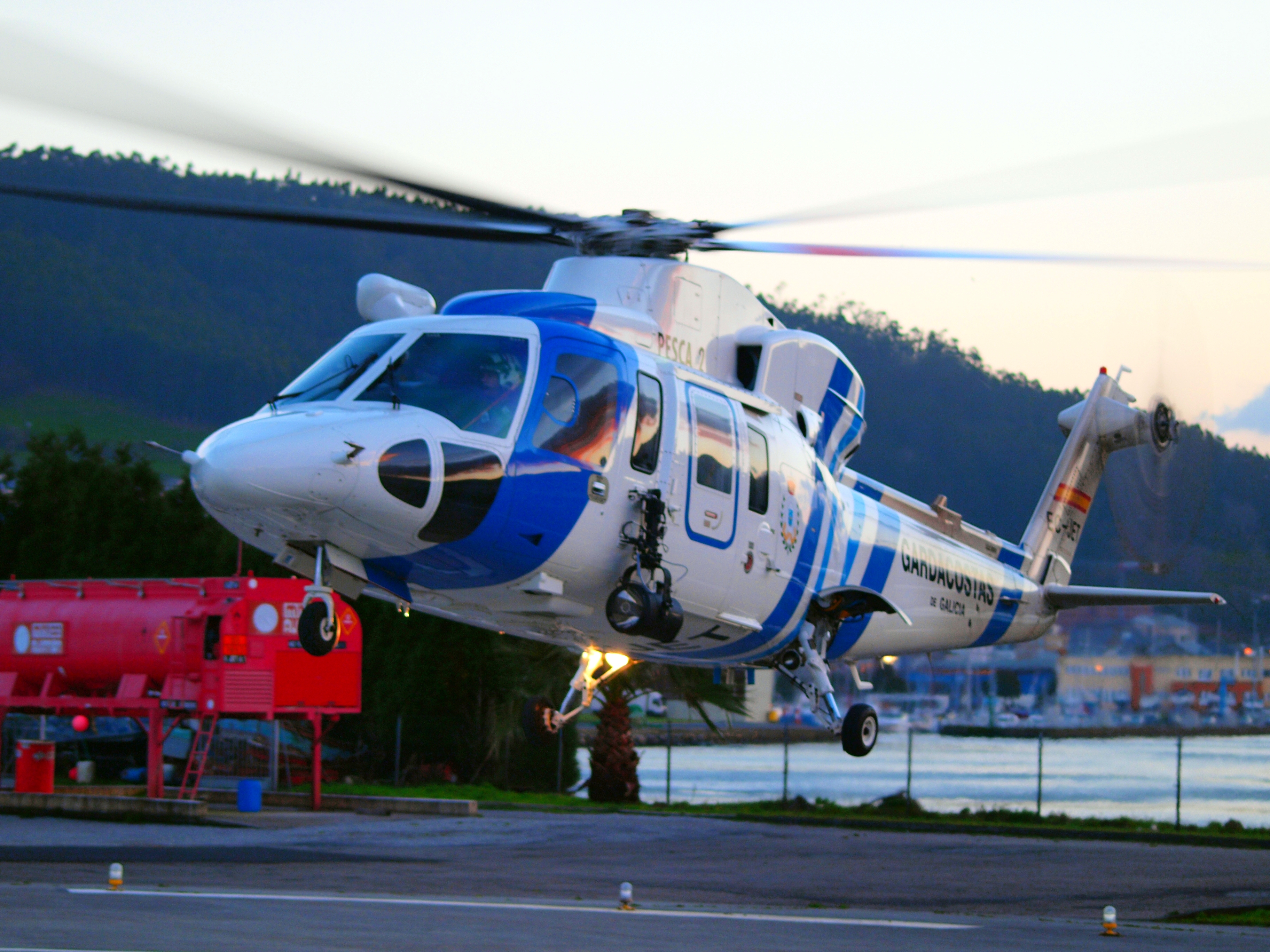 Fotografía: Enrique Pernas. Sikorsky S-76C+ (EC-JET) preparándose para una salida nocturna desde el helipuerto Costa Norte (Código OACI: LEPV). Tomada con una Olympus E-450 + objetivo 70-300. Retocado balance de blancos con GIMPshop